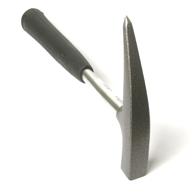 Geologenhammer mit Rohrstiel und Spitze, 300g Kopf, Kunststoffgriff